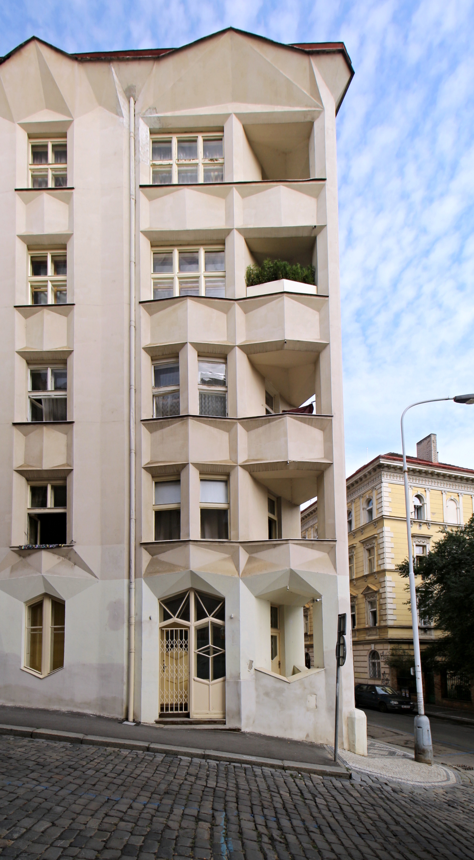 Kubistický dům v Neklanově ulici